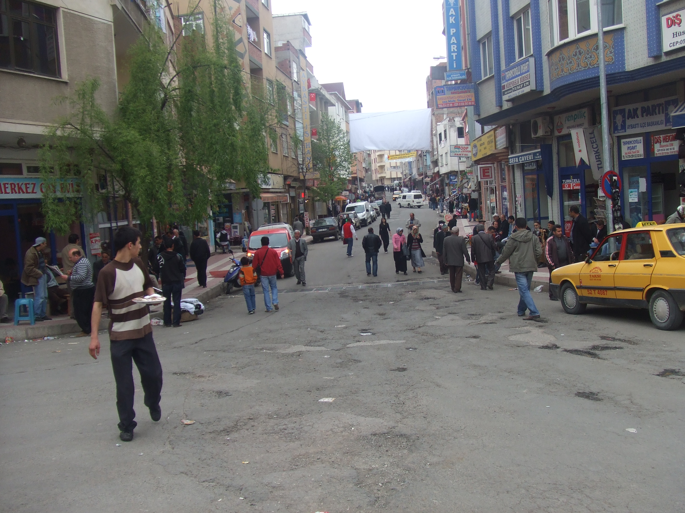 Ordu iline bağlı Aybastı ilçesinden bir görünüm.